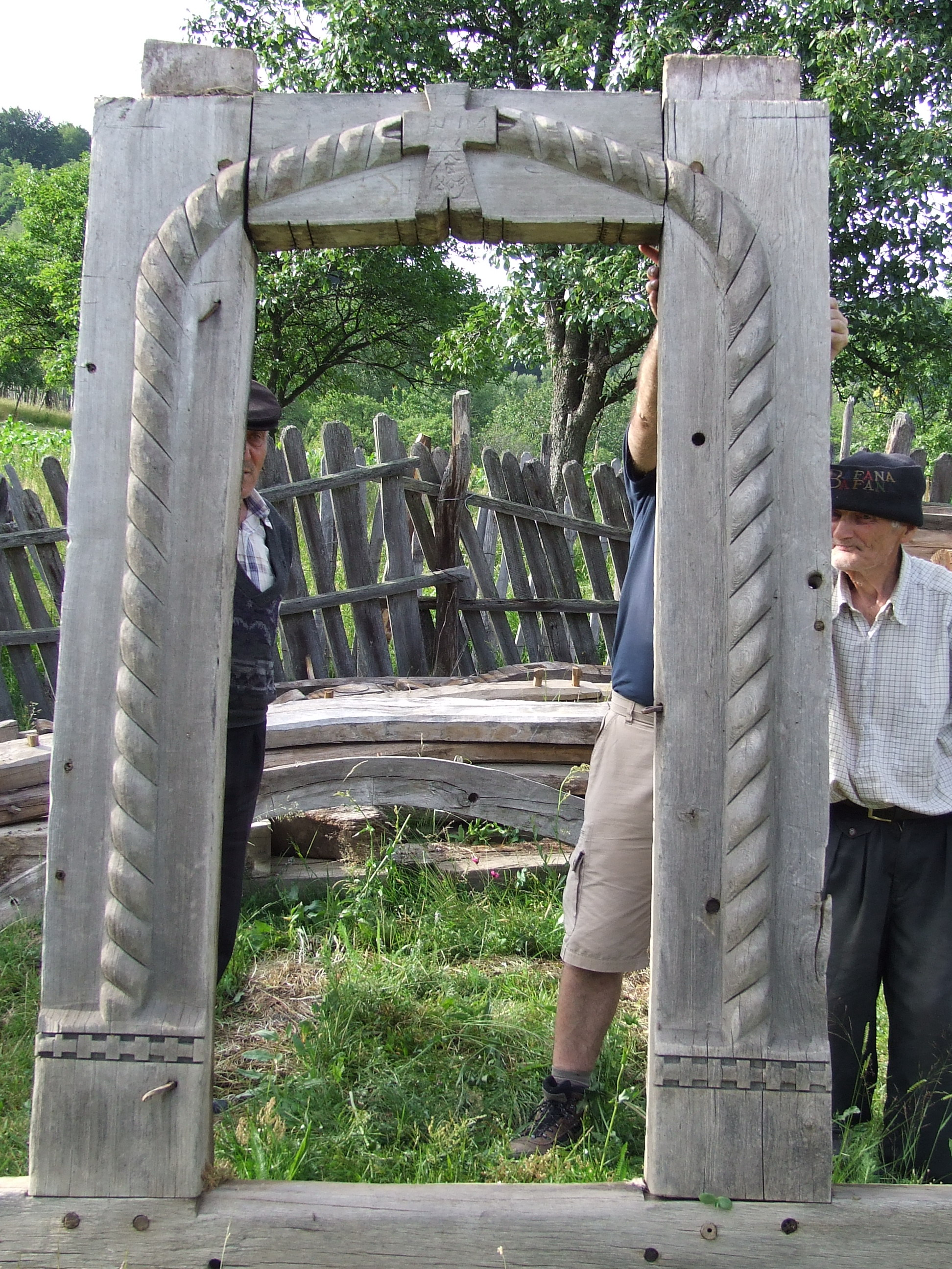 Portalul bisericii de lemn din Baia de Fier, cătunul Sohodol, județul Gorj (demontată în 2009)